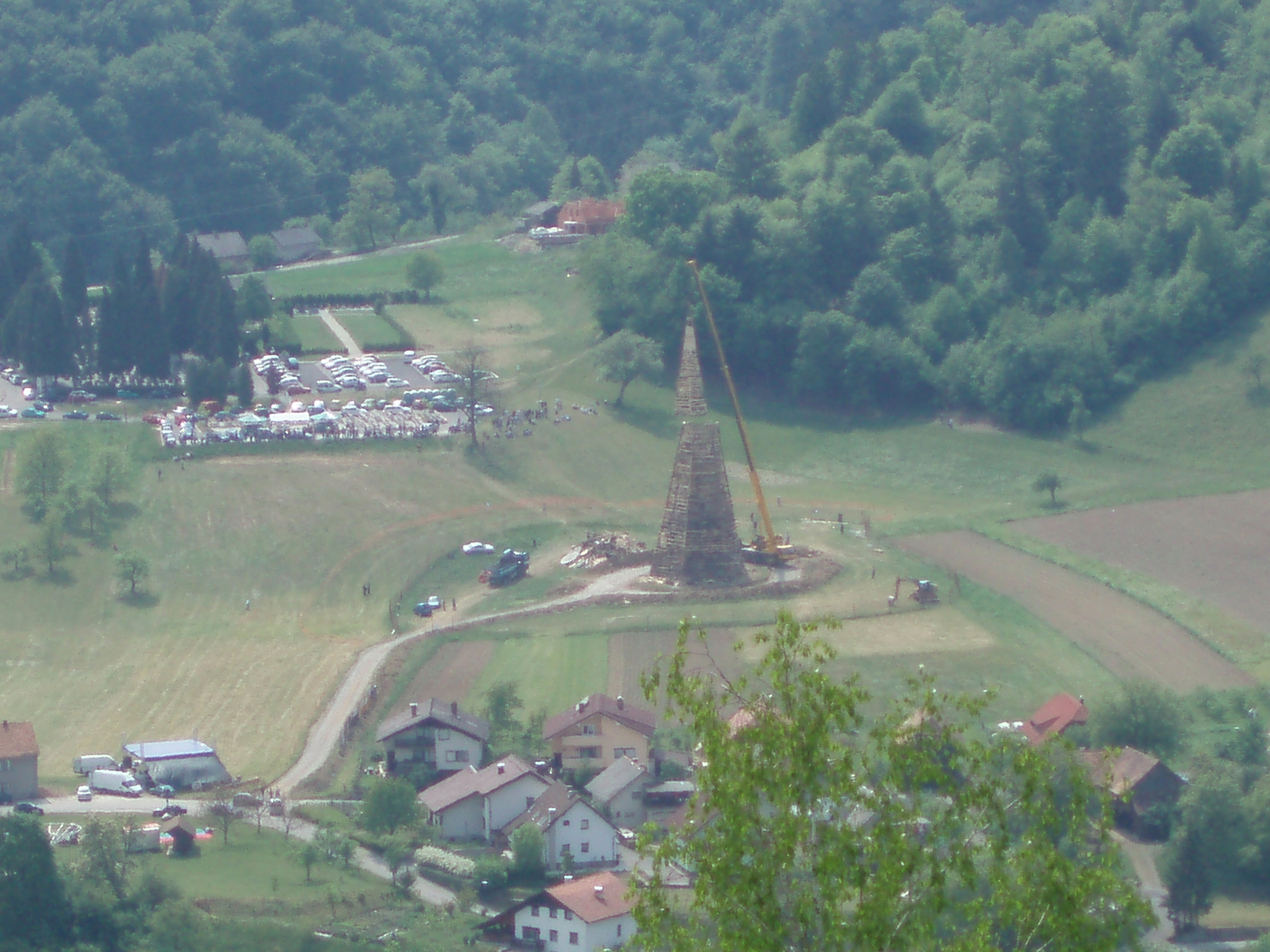 Pogled iz Zajčje Gore med gradnjo